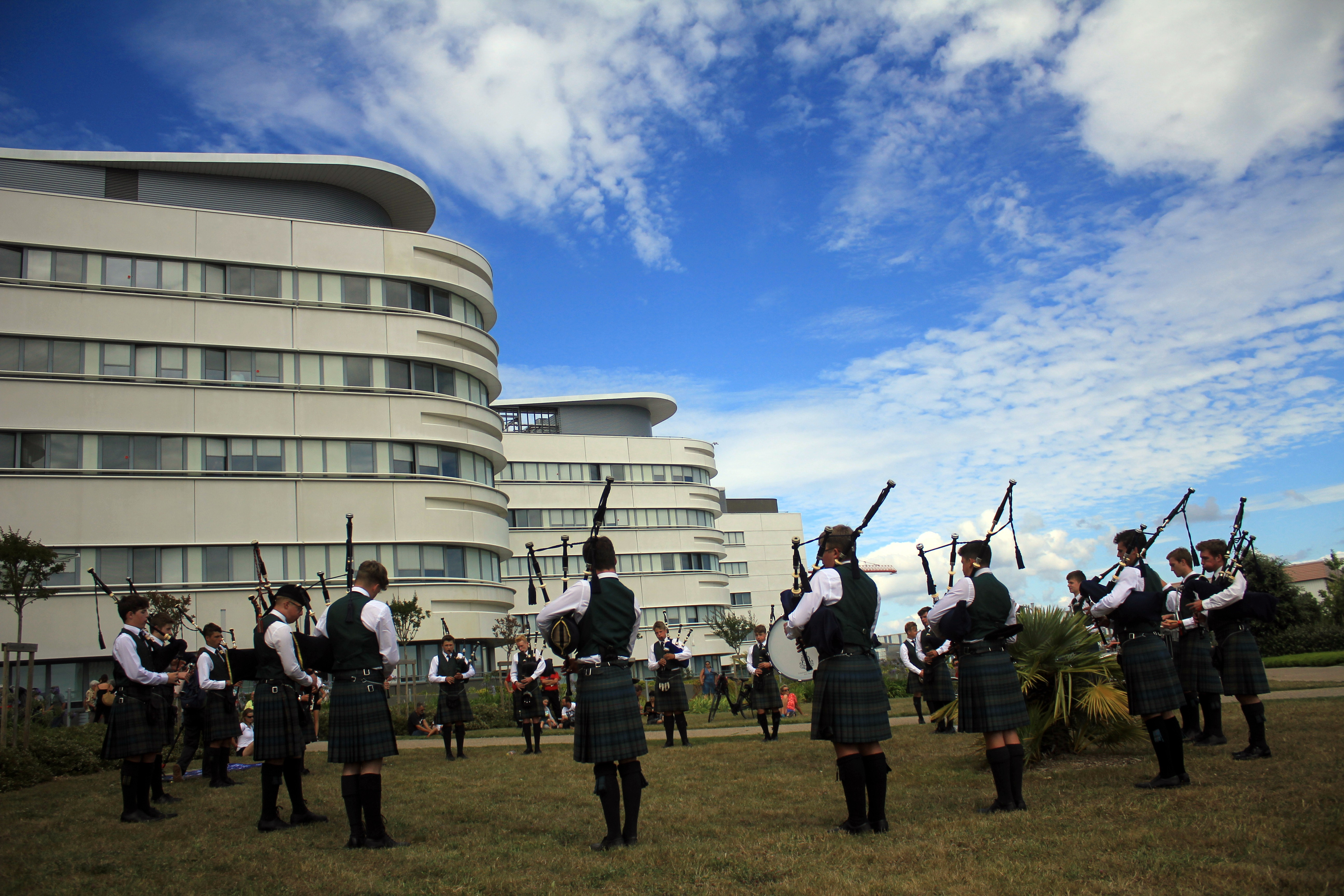 Le Strathallan School Pipe Band lors du festival interceltique 2018, ici lors d'une sortie extérieure à l'hôpital du Scorff.